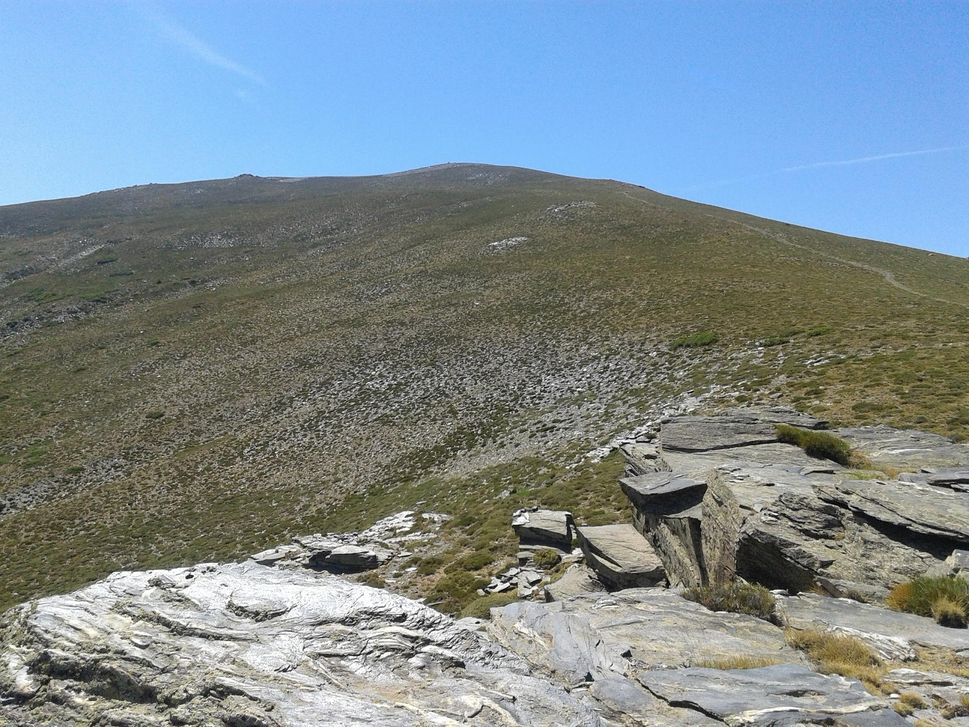 Imagen de la cima del Chullo desde Las Chorreras